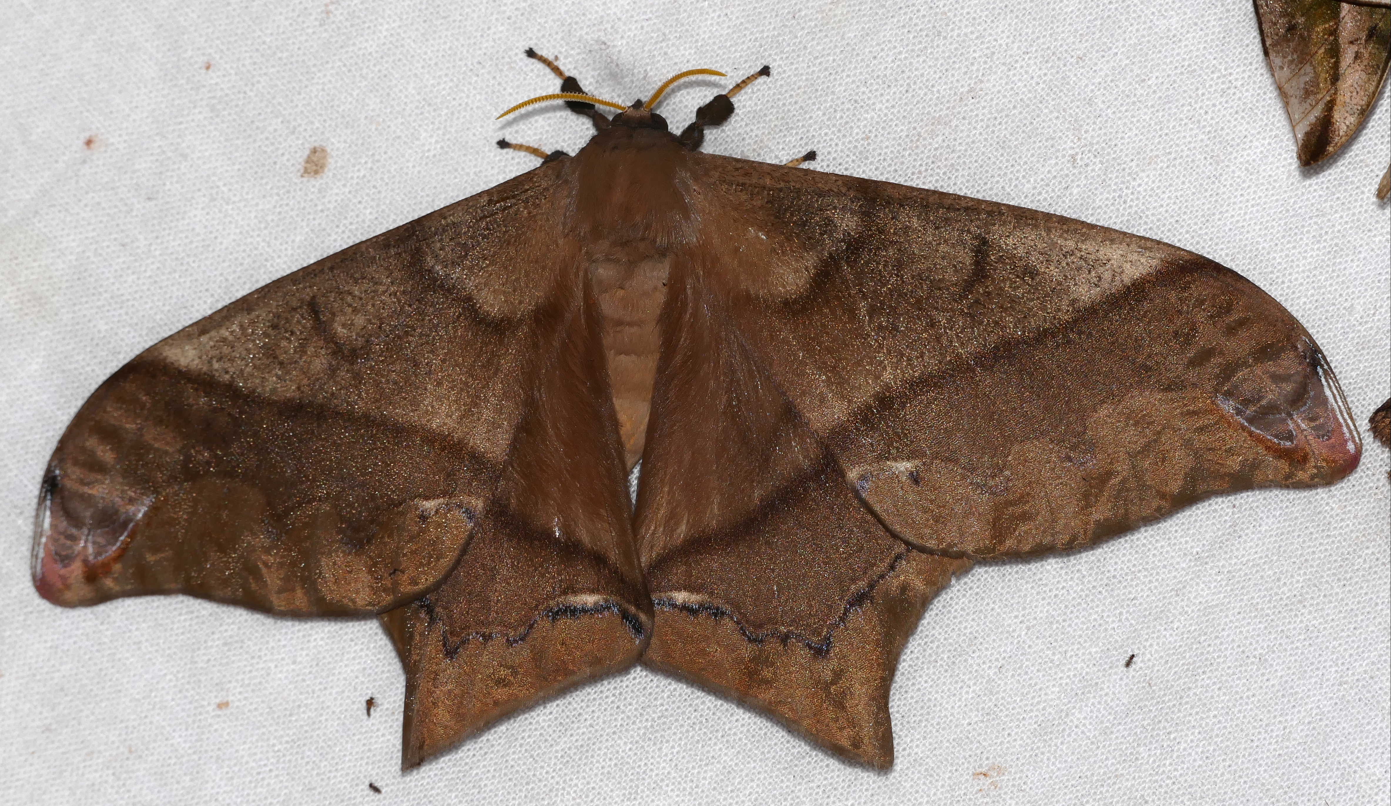 Piste de Belizon, Roura, French Guyana, FRANCE